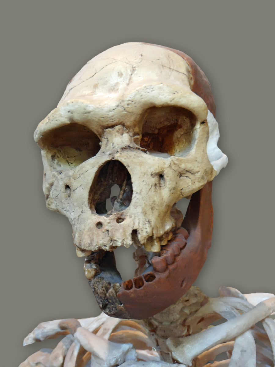 Crane de l'Homme de Tautavel, détail de la reconstitution du squelette En 1971, la découverte dans la Caune de l'Arago de l'Homme de Tautavel (daté à -450 000 ans) par les équipes du Professeur de Lumley a conduit à créer un pôle scientifique et culturel dans le village de Tautavel à proximité du chantier de fouilles archéologiques. Agé de vingt ans, l'homme de Tautavel mesurait 1m60. Cet homo erectus avait toutes les caractéristiques des premiers européens : un front fuyant, un bourrelet au-dessus des orbites, des pommettes saillantes et une mâchoire avancée. S'il ne maîtrisait pas encore le feu, il se révélait être un excellent chasseur. Le Musée de Tautavel Centre Européen de Préhistoire est un complexe construit autour de l'Homme de Tautavel. Il présente toute l'histoire de l'humanité en Europe depuis les premiers européens jusqu'aux portes de l'Histoire en prenant des exemples dans la très proche région de Tautavel. Extrait du site officiel Le site du musée de préhistoire de Tautavel Site du ministère de la culture sur les fouilles de Tautavel